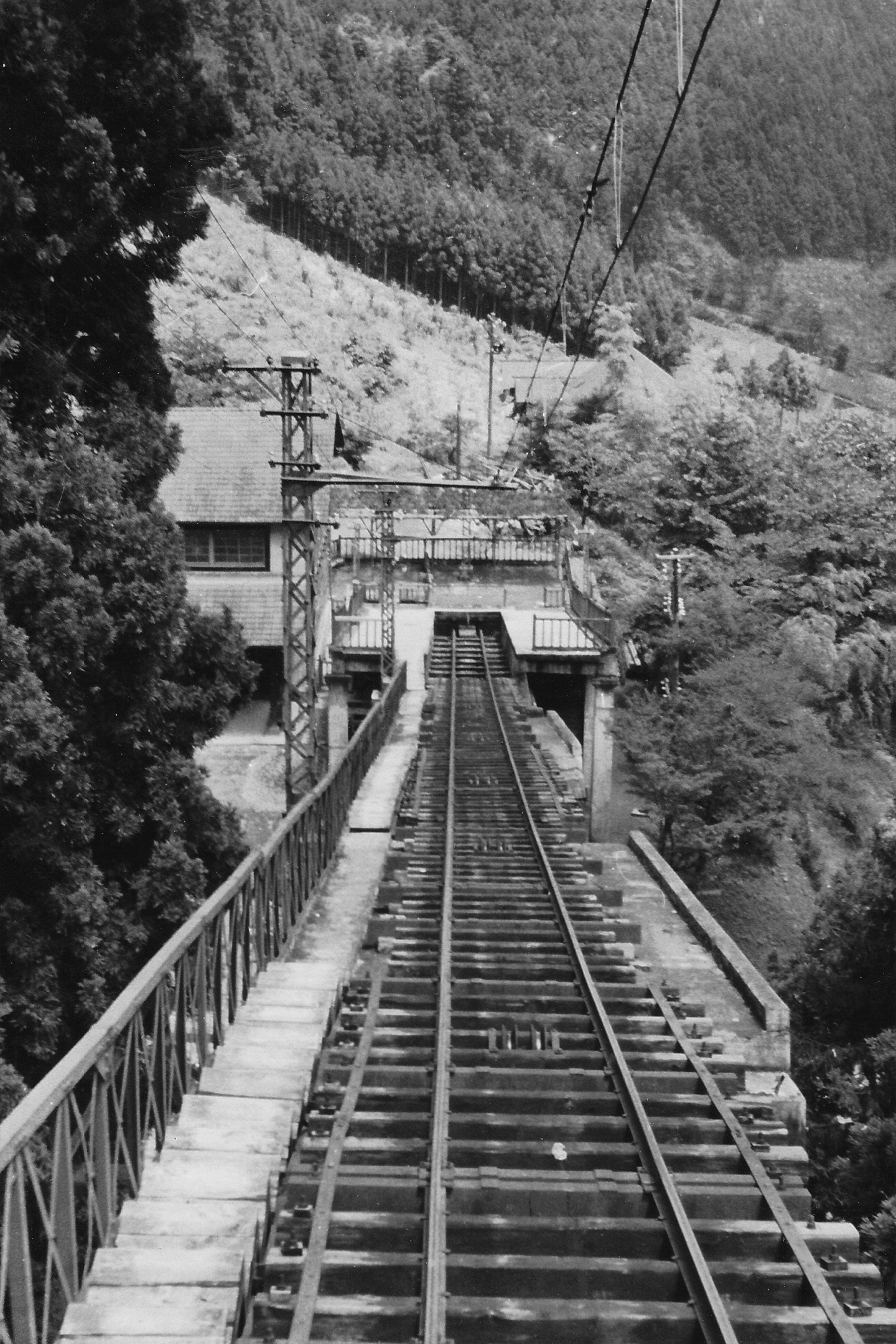 御岳登山鉄道の御岳山駅（1956年7月）